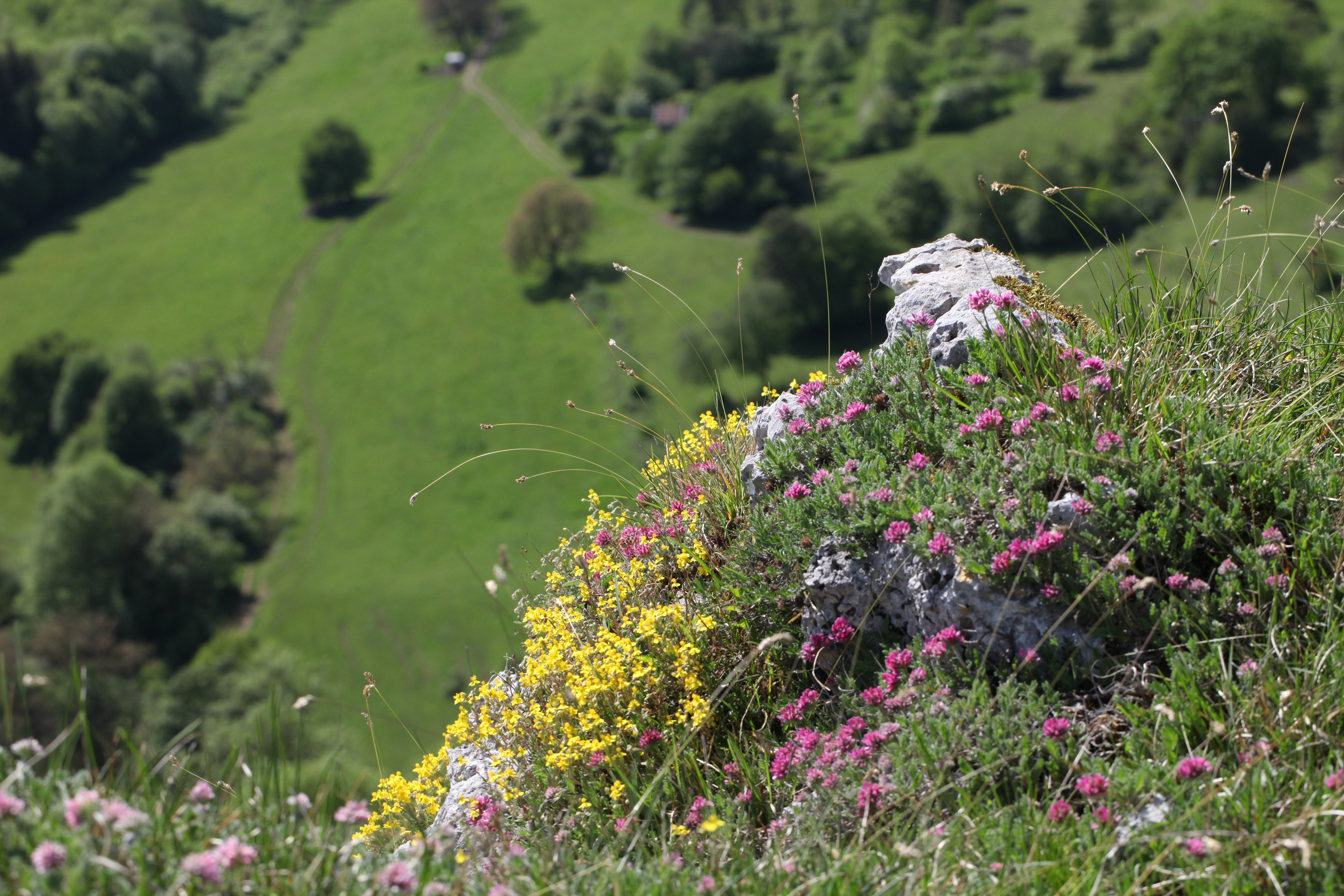 Hélianthème et vulnéraire des montagnes colorent en mai la corniche du ravin de Valbois.